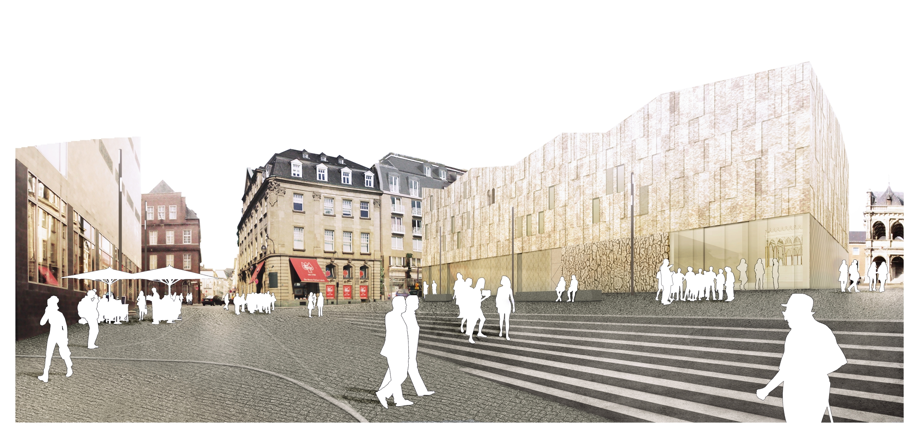 Bauplanung Archäologische Zone Jüdisches Museum Köln